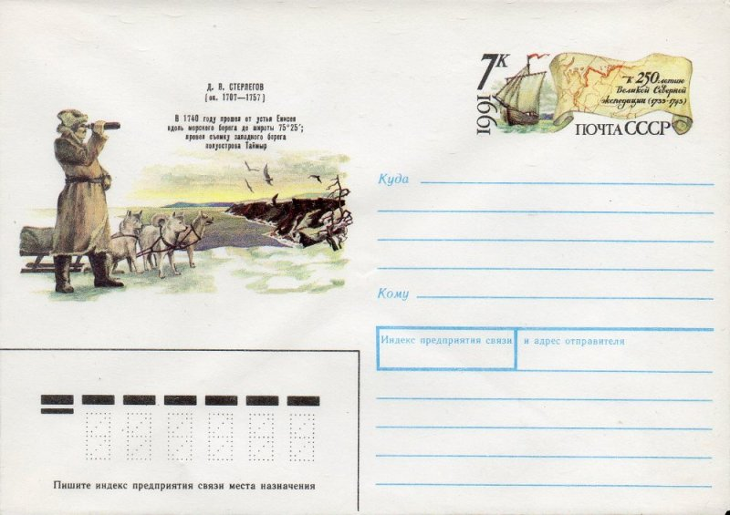 «К 250-летию Великой Северной экспедиции (1733—1743). Д. В. Стерлигов (ок. 1707—1757)».